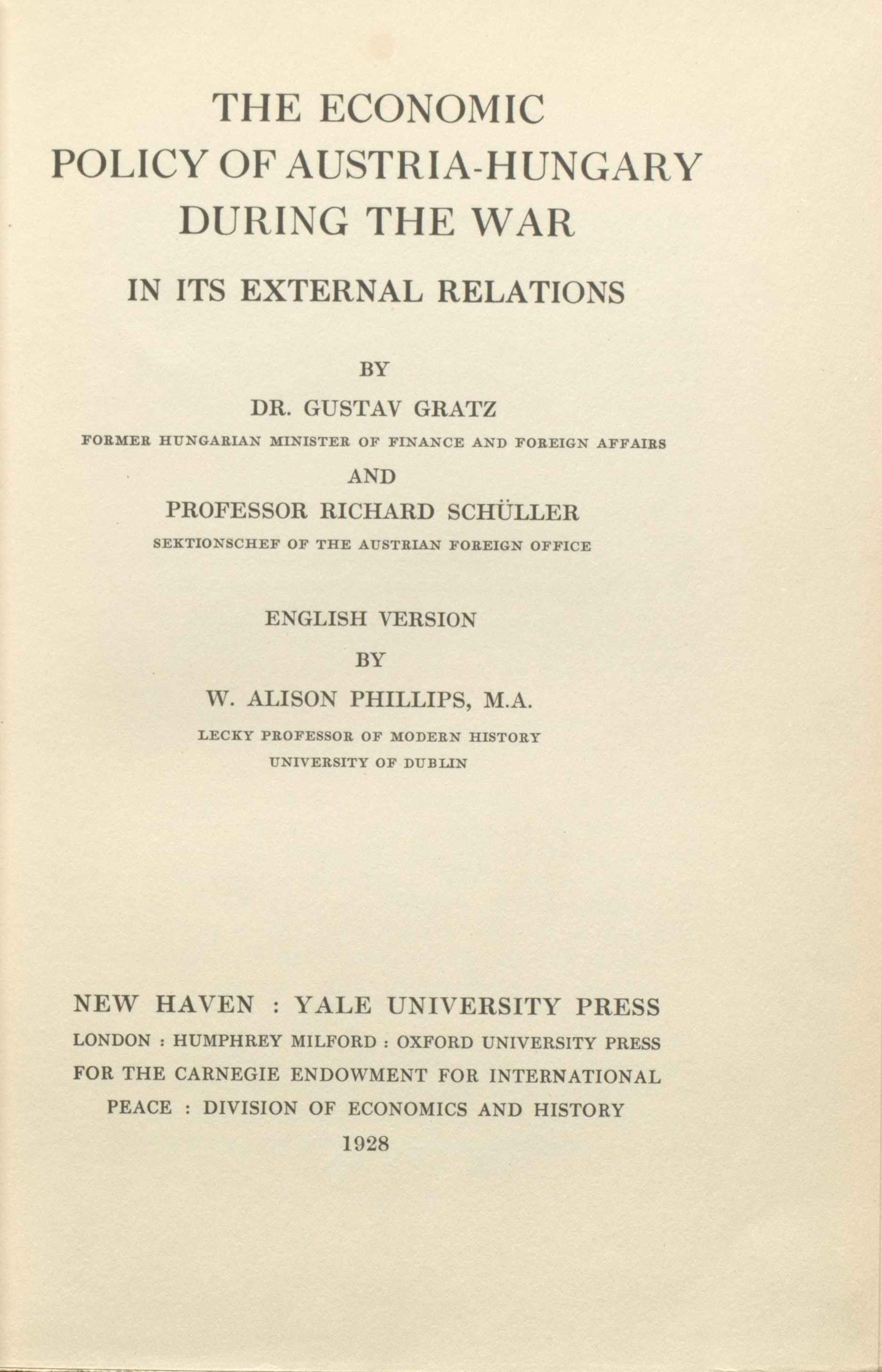 Gusztáv Gratz Richard Schüller The Economic Policy of Austria-Hungary During the War 1928 Title